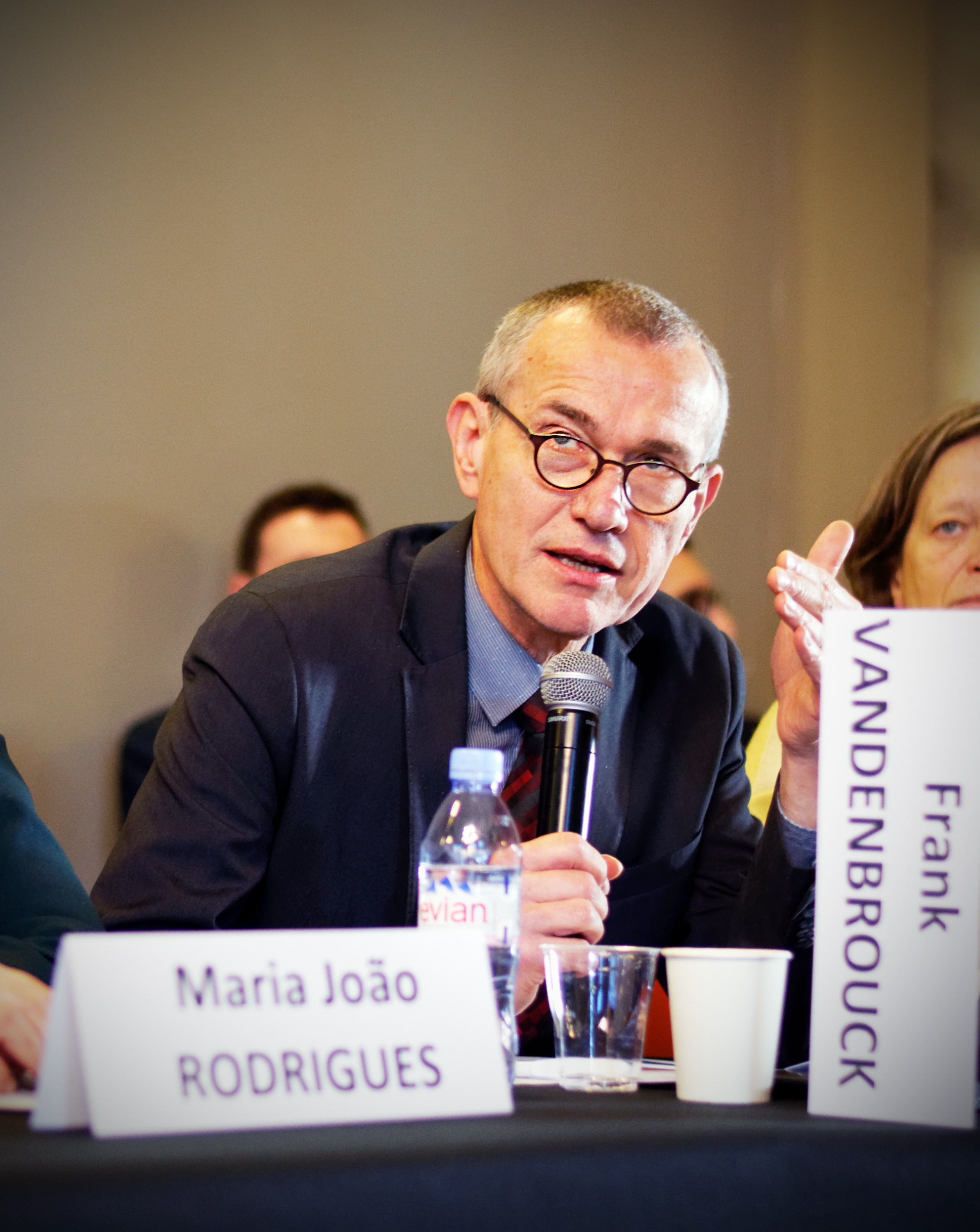 Frank Vandenbroucke - Comité européen d'orientation de l'Institut Jacques Delors - Paris 9 décembre 2017